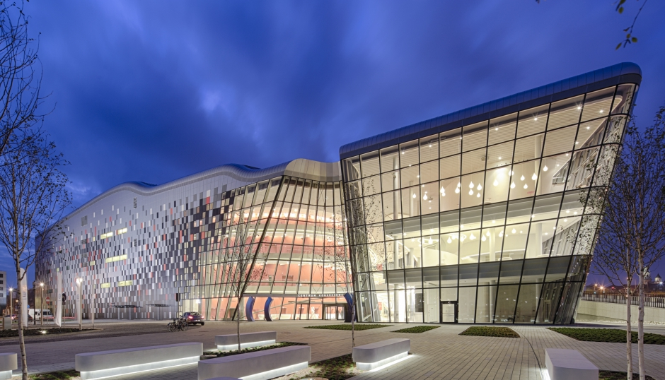 Centrum kongresowe - Kraków